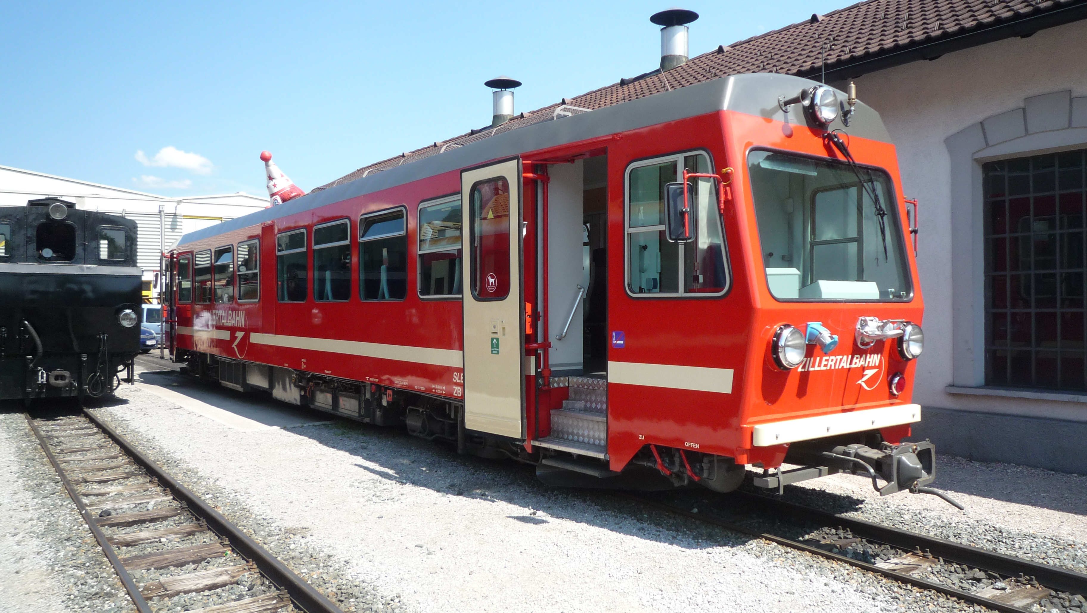 Der VT1 der Zillertalbahn steht am 15. Juni 2013 in Jenbach anlässlich des Tag des offenen Tals.